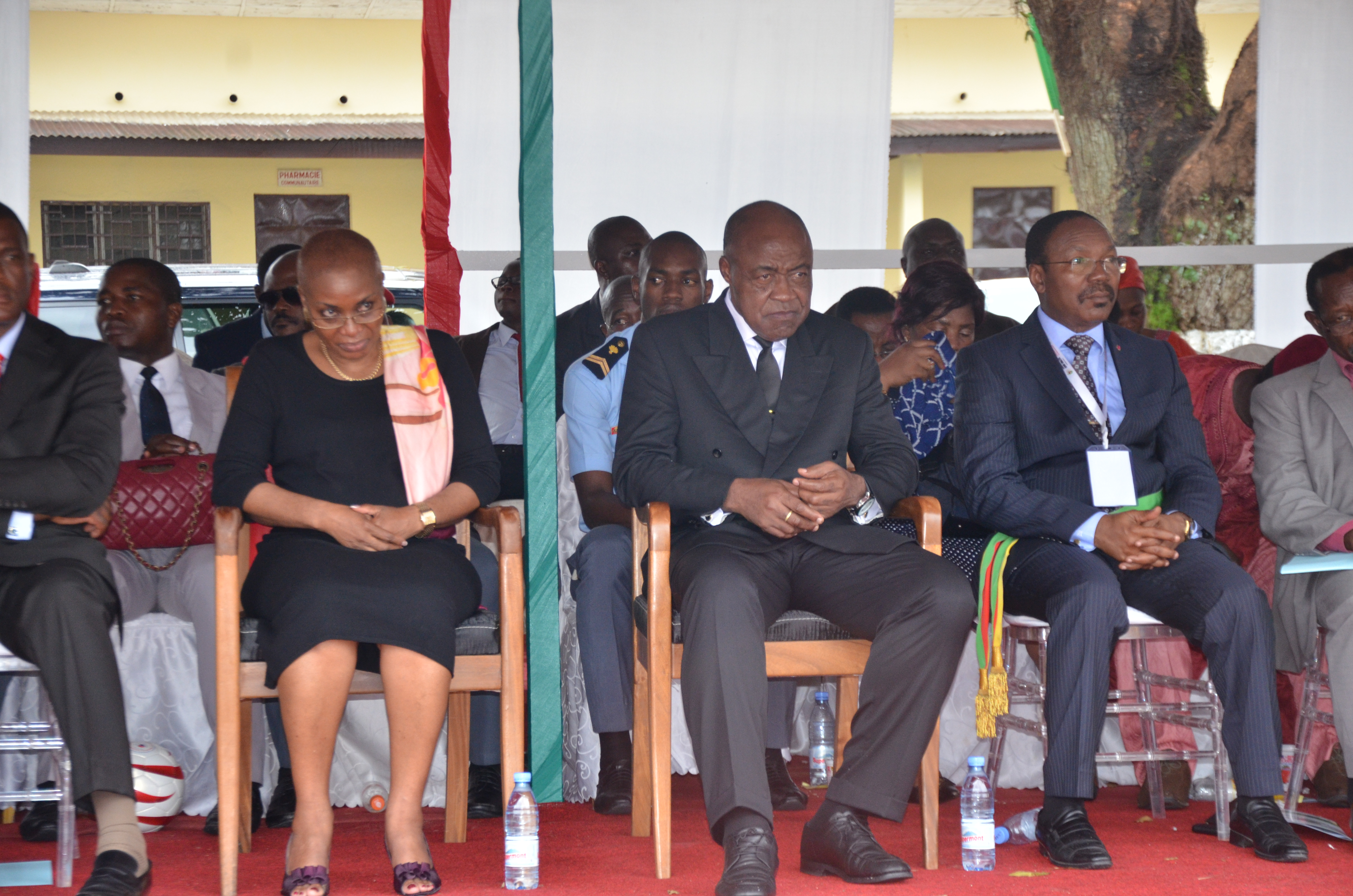 La ministre camerounaise des affaires sociales lors de la Coupe d'Afrique des Nations pour aveugles et déficients visuels au côté du ministre des sports et de l'éducation physique, Pierre Bidoung Mkpatt